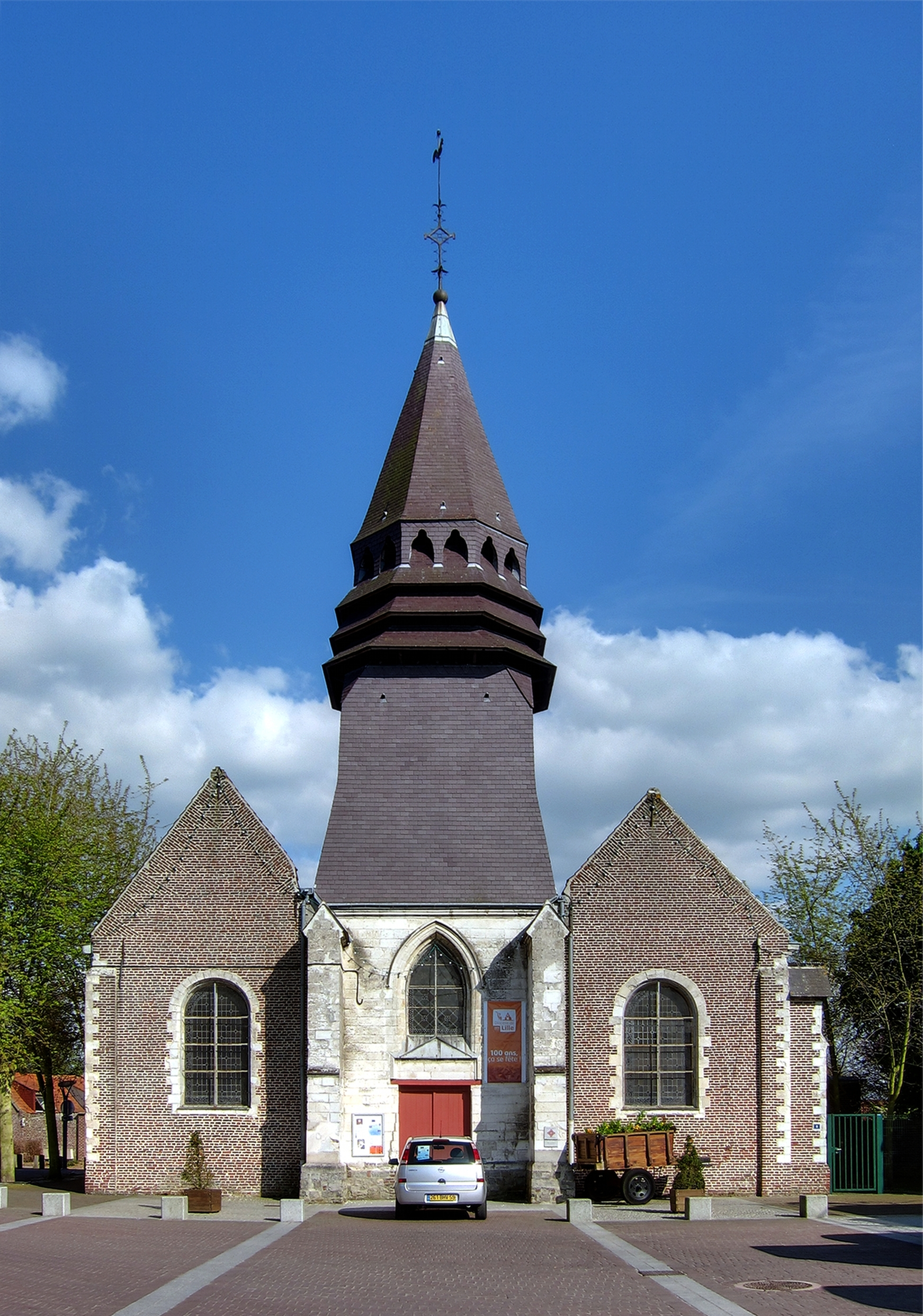 L'église Saint-Martin d'Houplin.